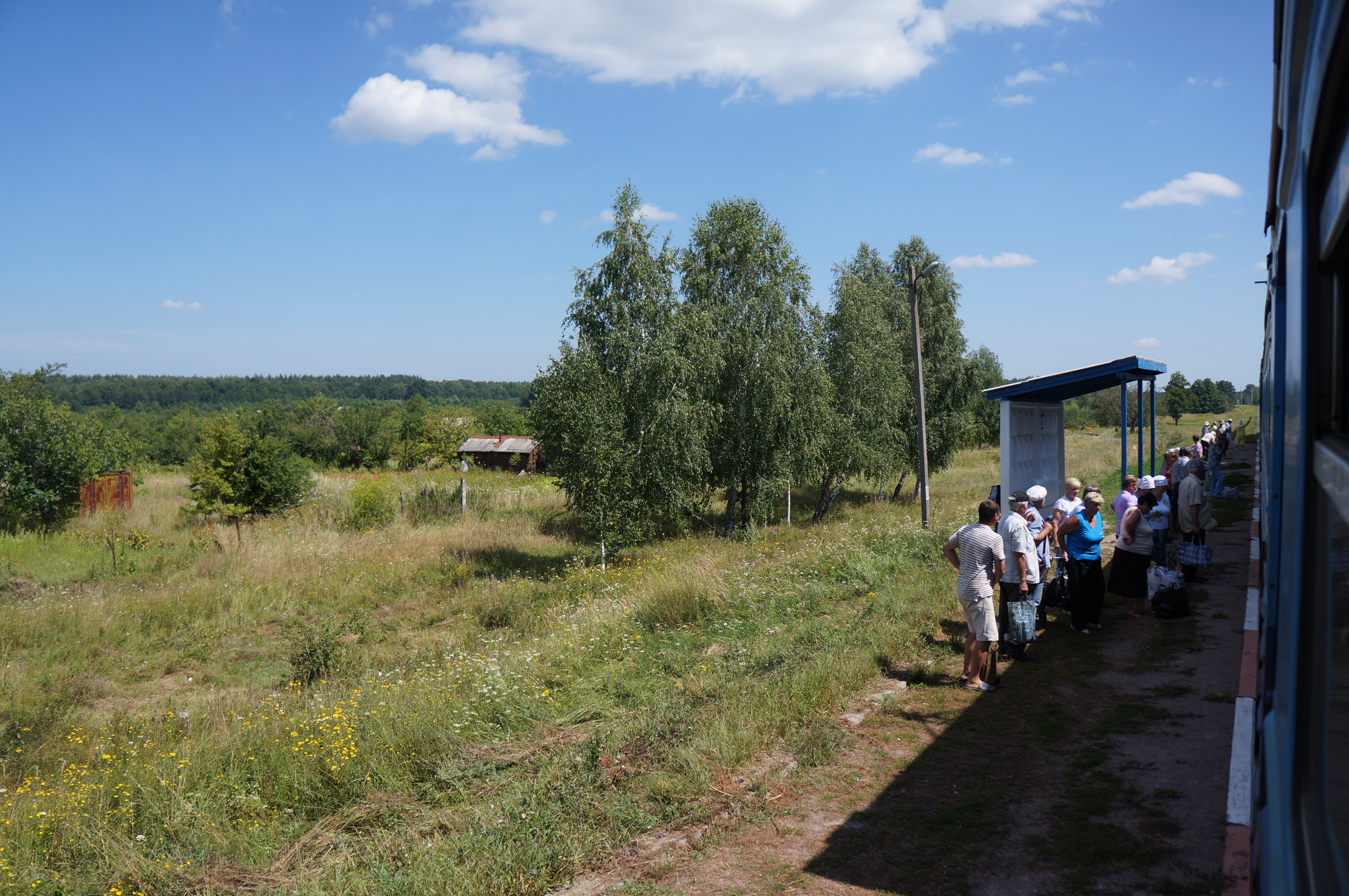 Залізнична платформа 62 км